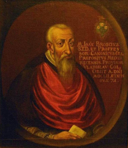 Nieokreślony malarz krakowski